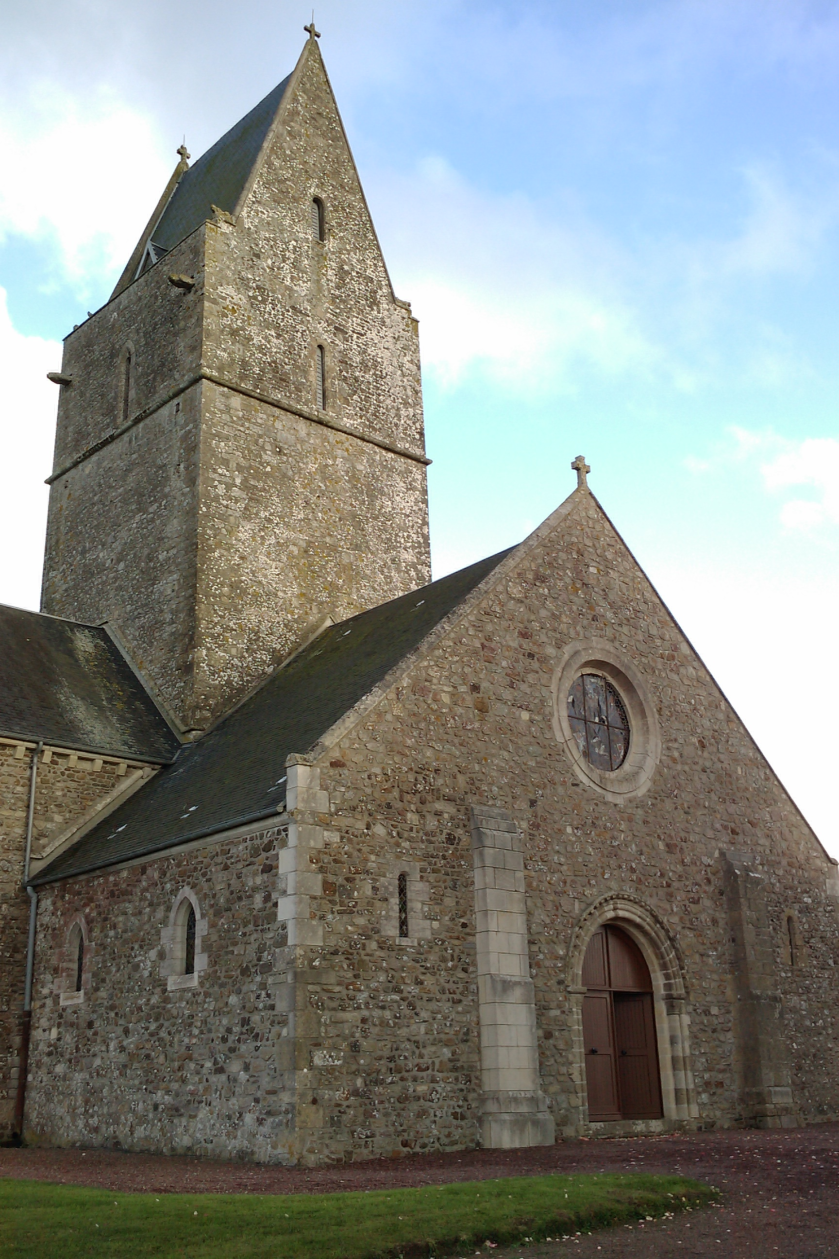 Église de Montgardon